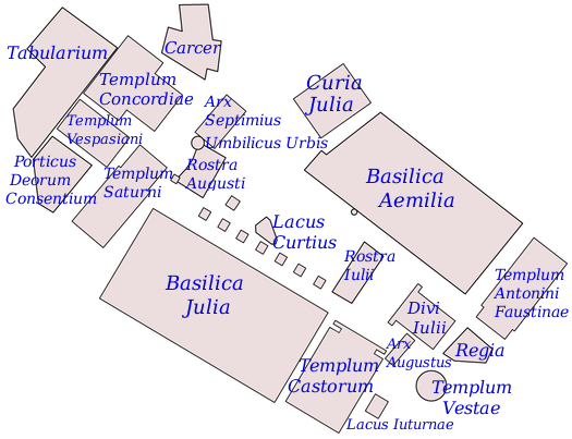 Mapa del edificis del fòrum romà a finals de l'imperi.